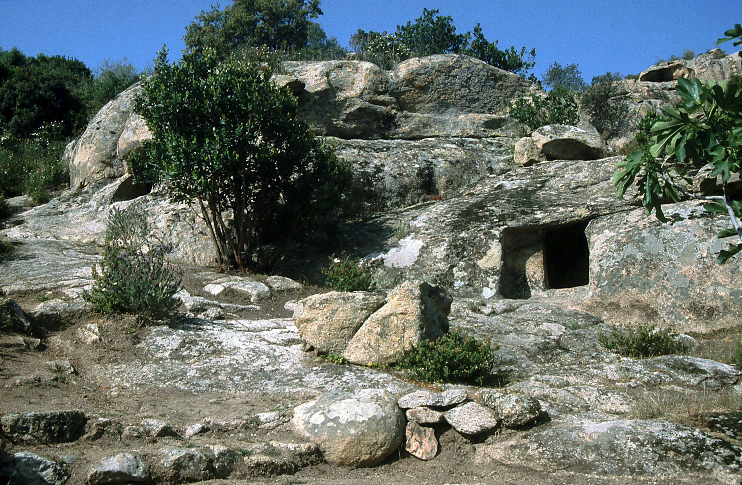 Domus de Janas